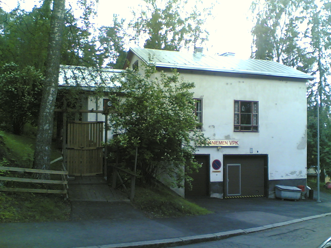 Marjaniemen VPK Palopirtintie